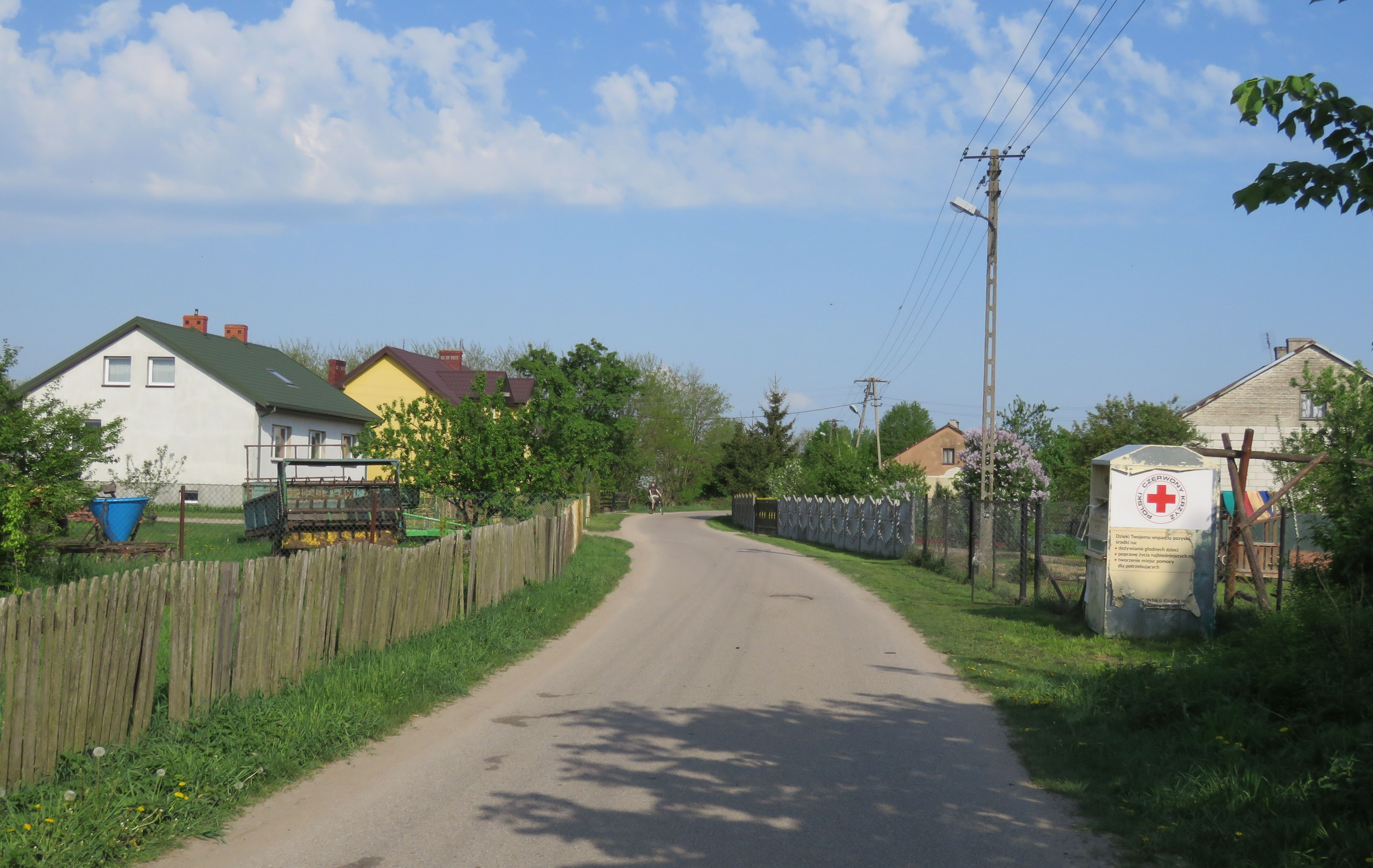 Milewo, gm.Zawidz